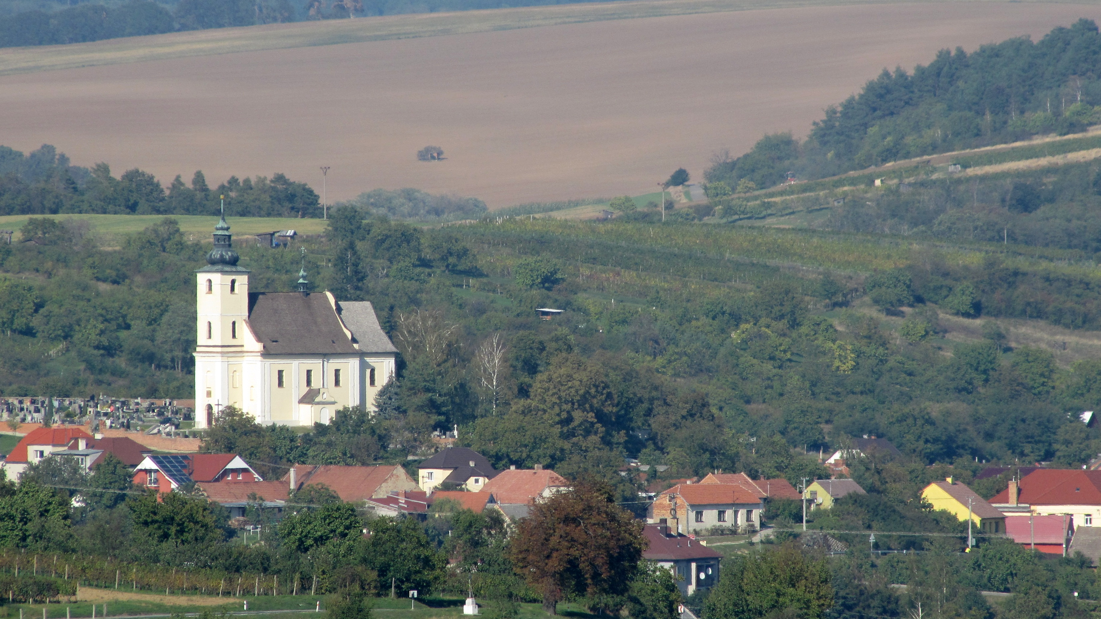 Pohled na kostel sv. Jakuba v Ježově z kopce nad Žádovicemi